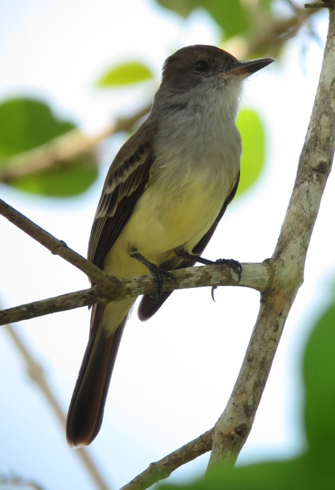 Arauca, Arauca, Colombia